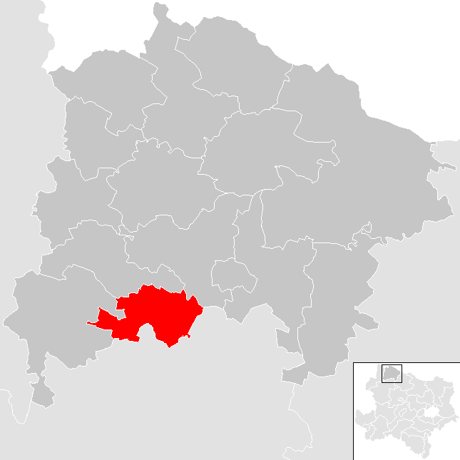 Bezirk Waidhofen an der Thaya